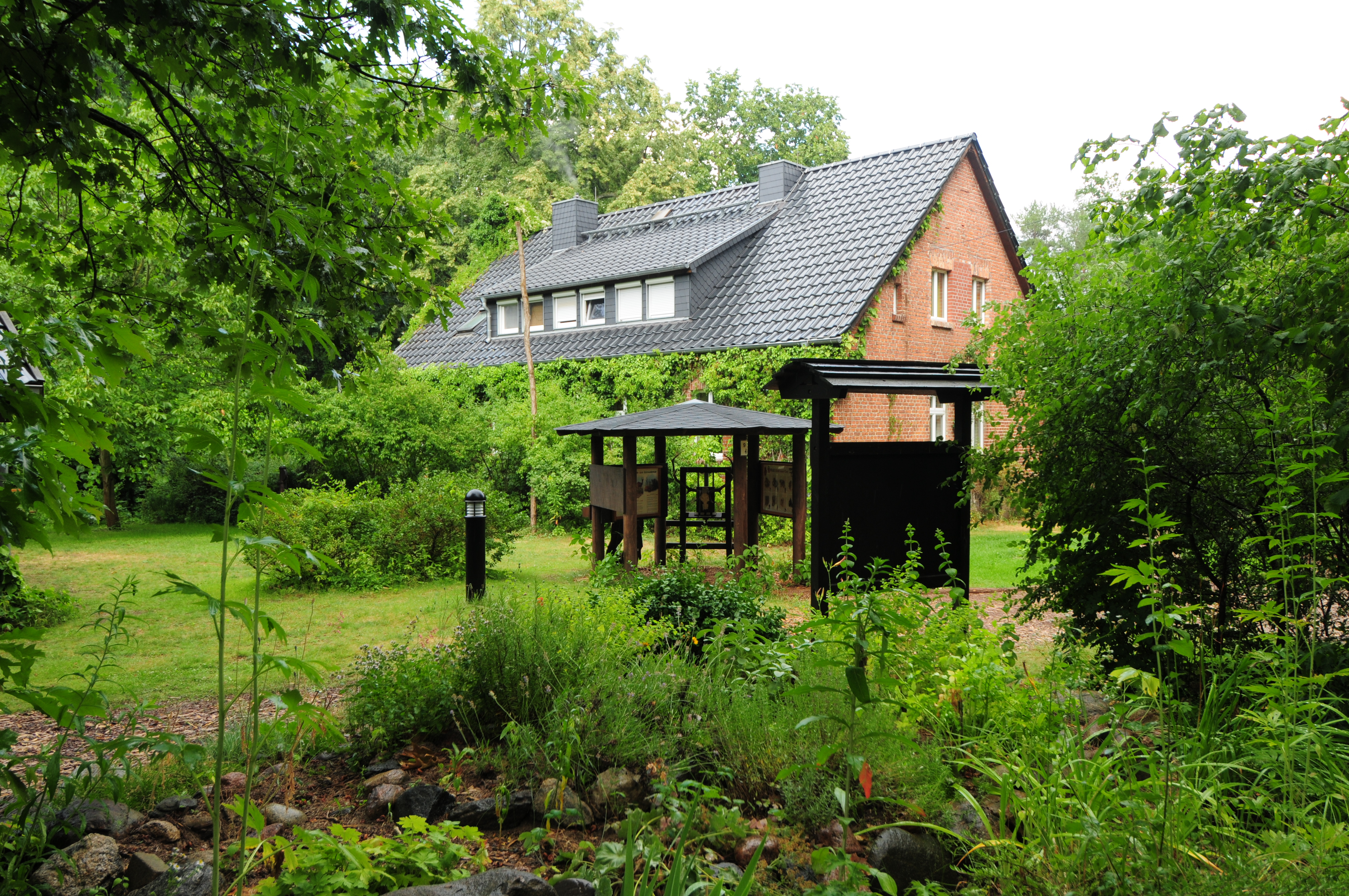 Gräbendorf: Haus des Waldes (Deutschland, Land Brandenburg)